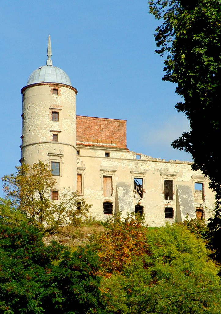 Janowiec, ruiny zamku, XVI-XX